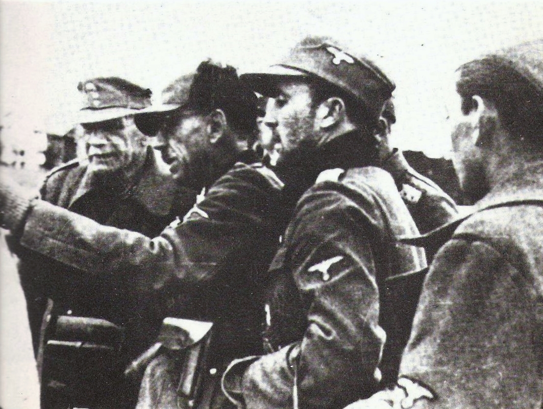 Il generale Artur Phleps, comandante del V Corpo d'armata da montagna delle SS, dirige le operazioni antipartigiane in Jugoslavia